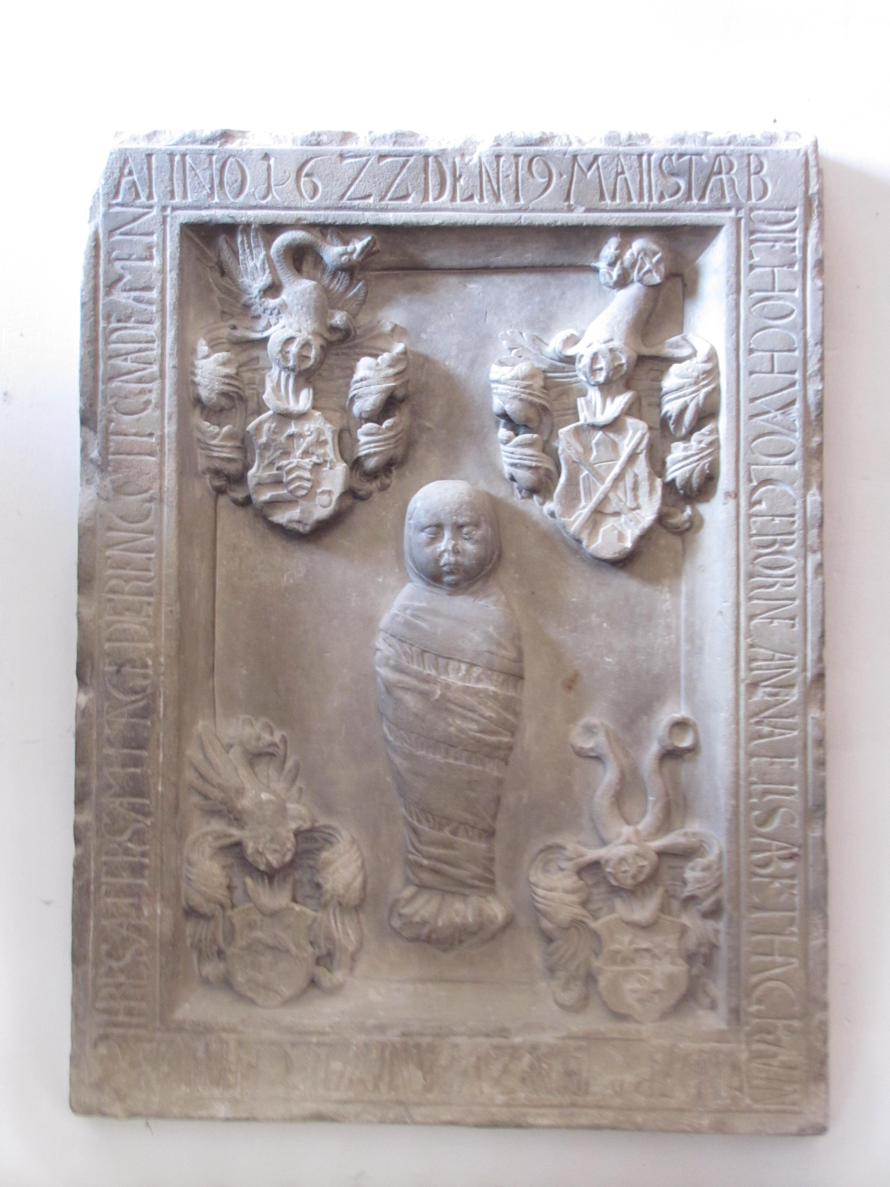 Alsace, Bas-Rhin, Église protestante de Bouxwiller (PA00084645, IA67009578). Pierre tombale de Anne-Elisabeth de Hanau-Lichtenberg (1622)